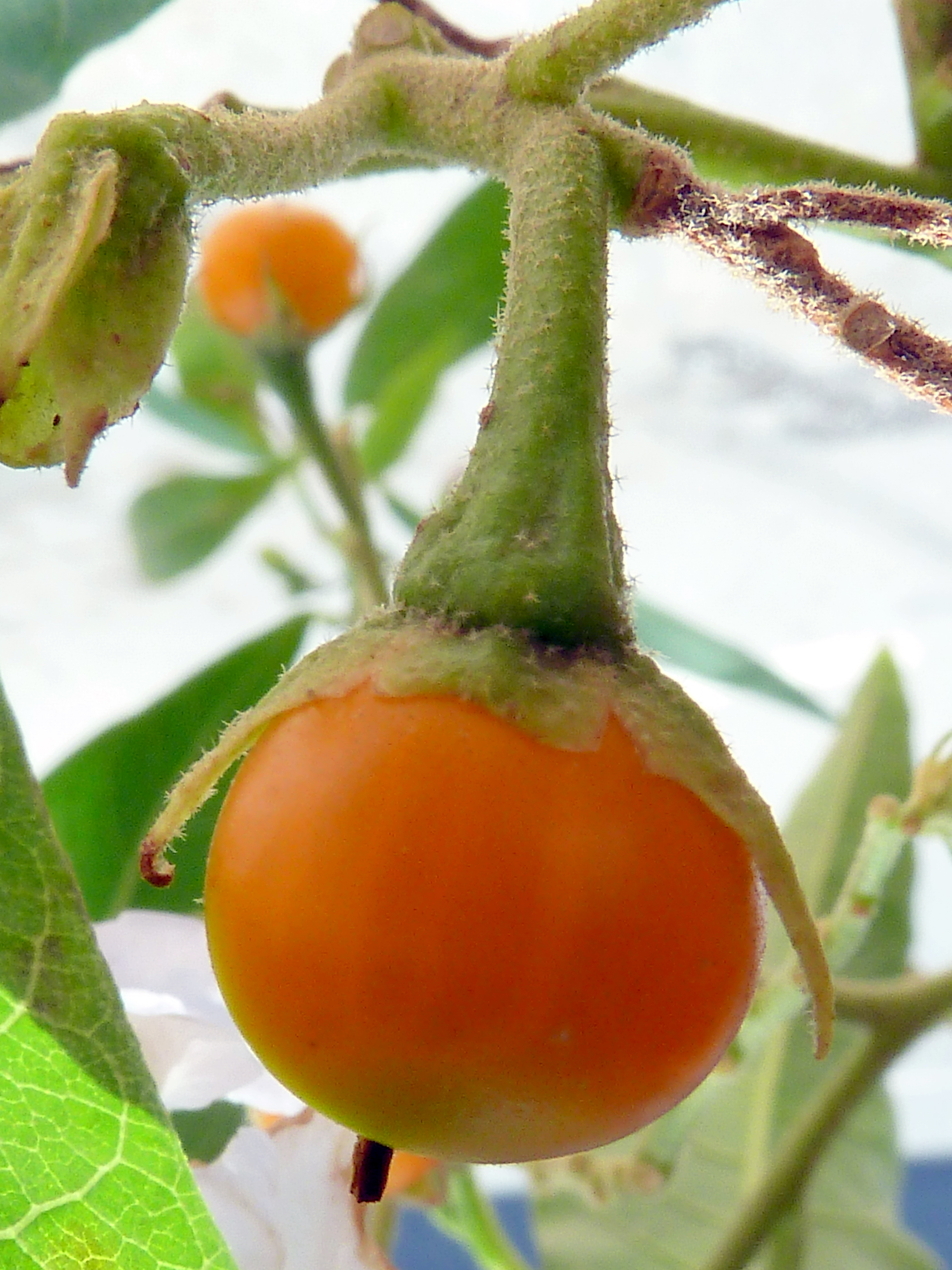 Solanum bonariense : Fruto - Ornamental, Avenida del Calvario, Albatera (Alicante, España).